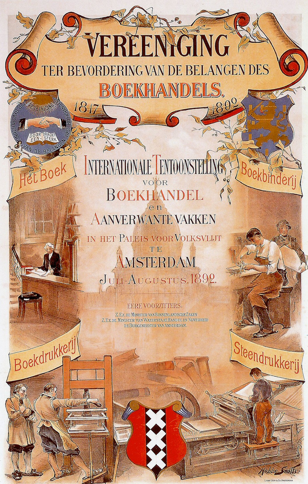 Eigen scan uit Het doel der Vereeniging; afbeelding uit 1892 auteursrechtvrij.